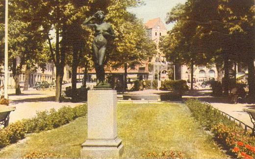 Ronneby. Torgparken. Postgånget 1944